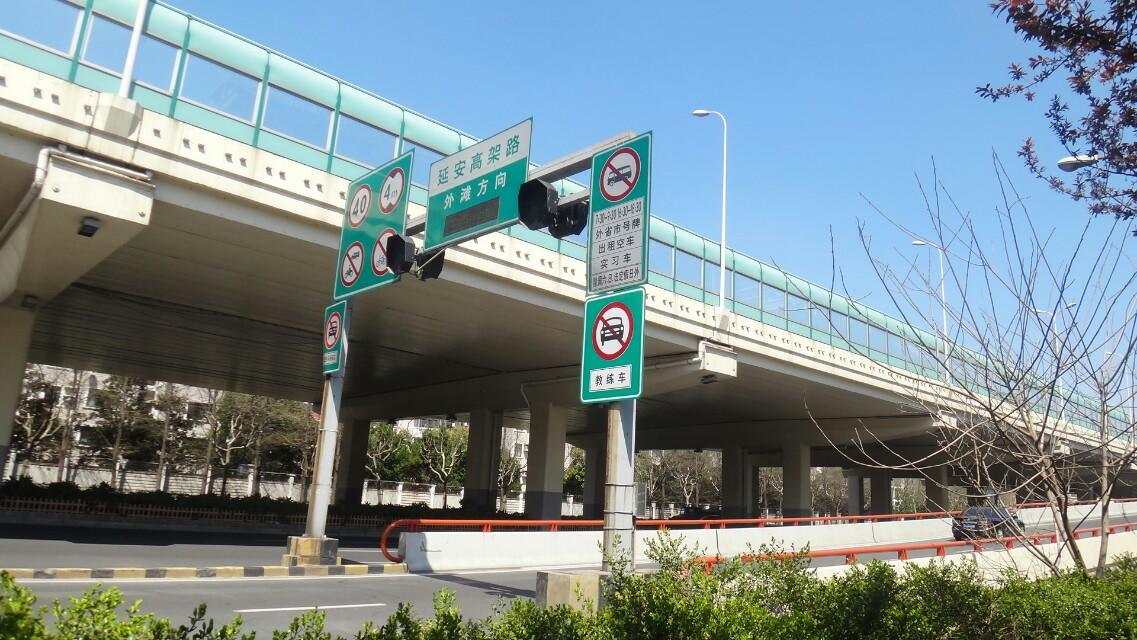 中文（中国大陆）: 上海延安高架路虹井路西向东上匝道，接纳外环线南向东和沪青平公路车流。